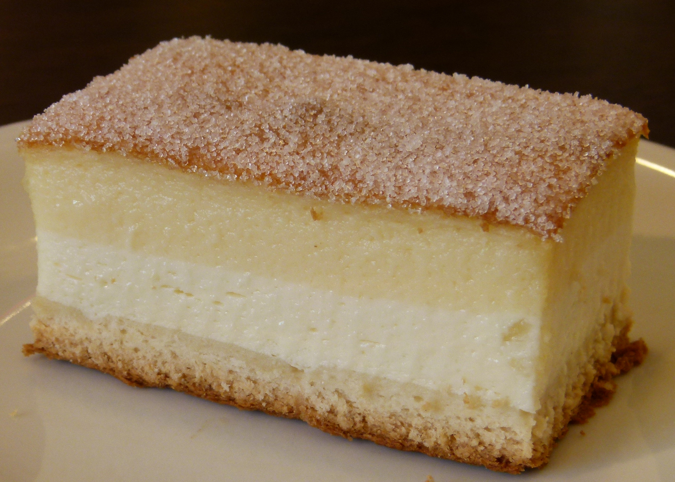 Dresdner Eierschecke in der Konditorei "Schäfer's" auf dem Weißen Hirsch in Dresden